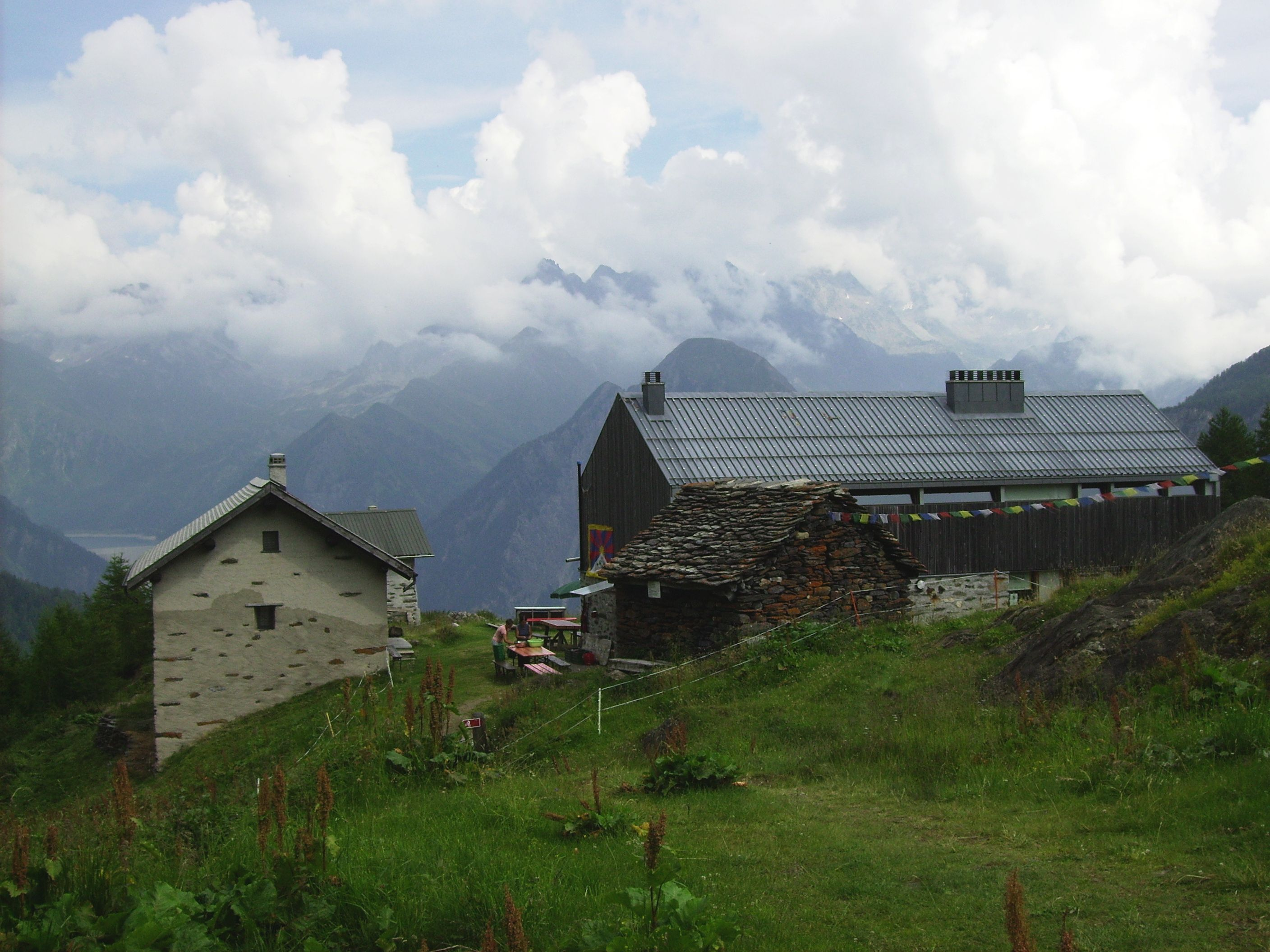 Die Capanna Bovarina mit Nebengebäude , dem Lago Luzzone und dem Adula-Massiv (rechts in Wolken)